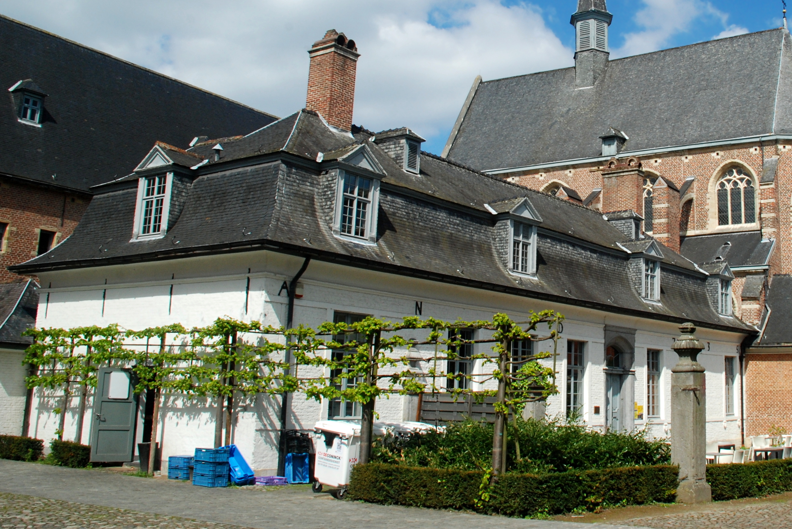 Belgique - Louvain - ancien hôpital Sainte-Élisabeth - ancienne pharmacie